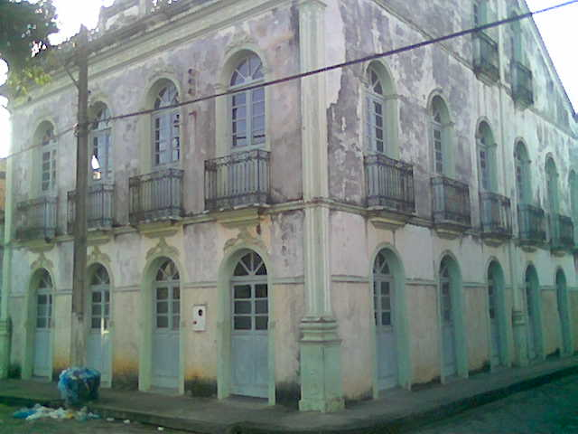 Sobrado em Alcobaça, Bahia, Brasil.